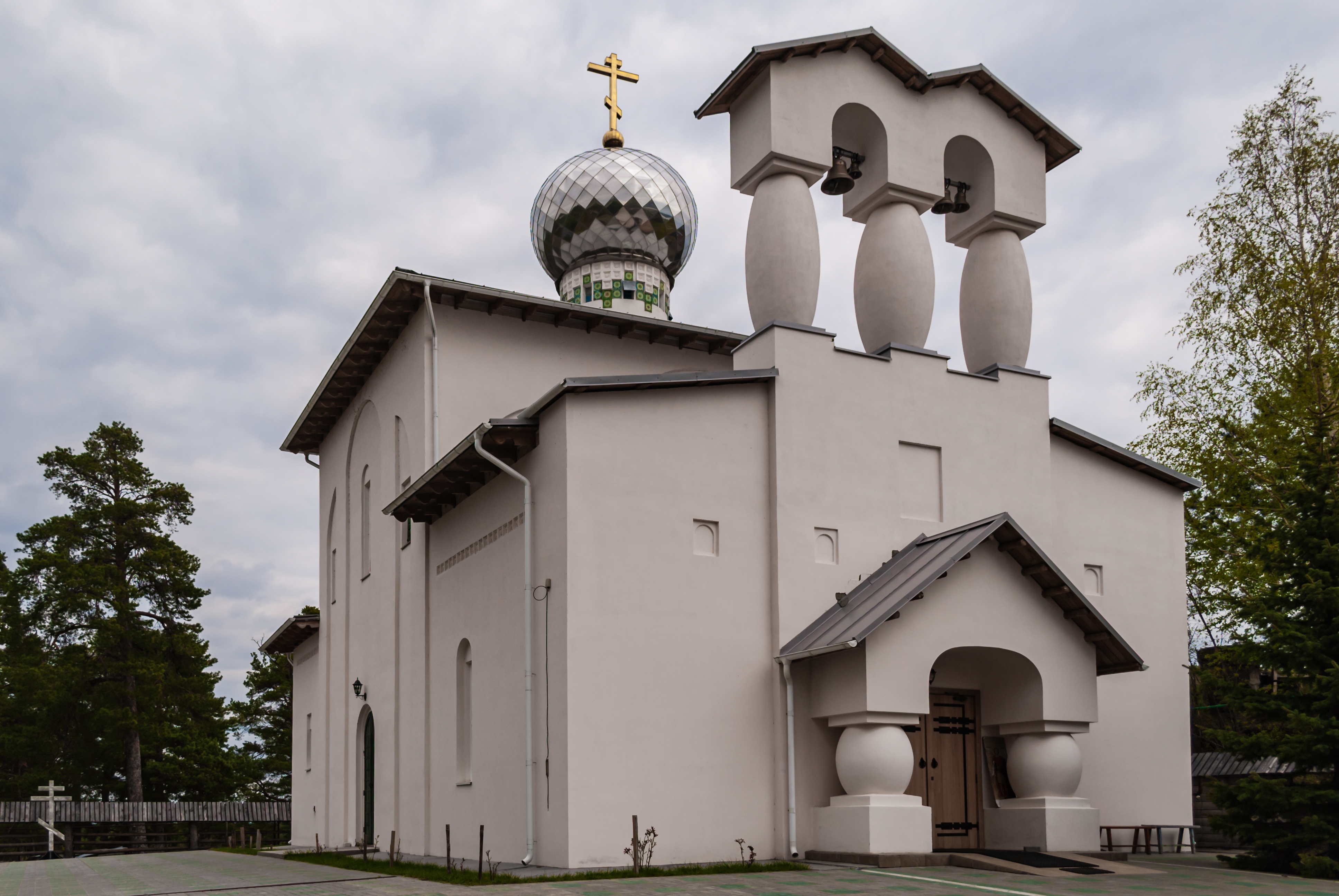 Храм Державной иконы Богоматери в посёлке Память Парижской Коммуны